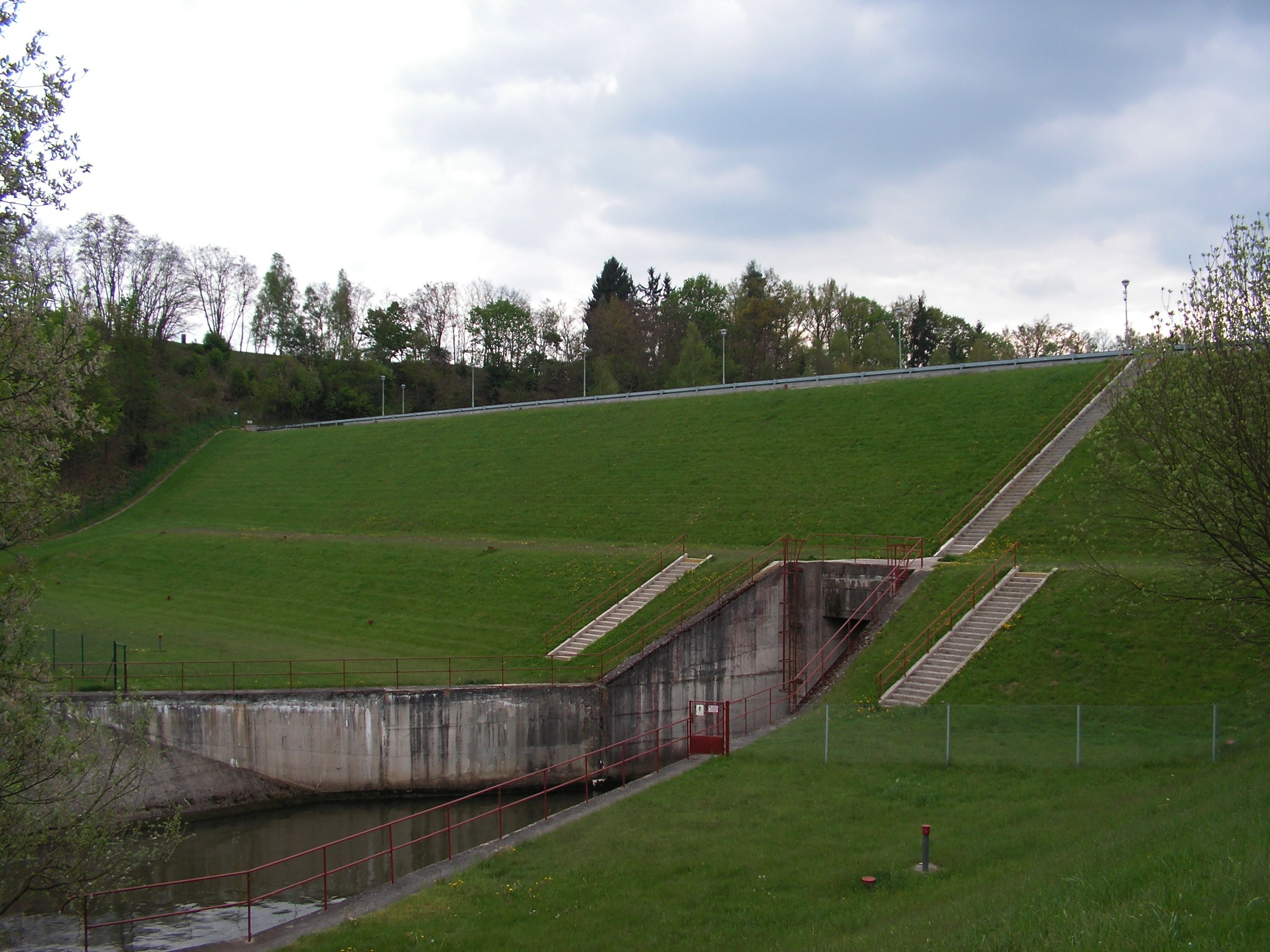 Hráz VD Trnávka na řece Trnavě v okrese Pelhřimov